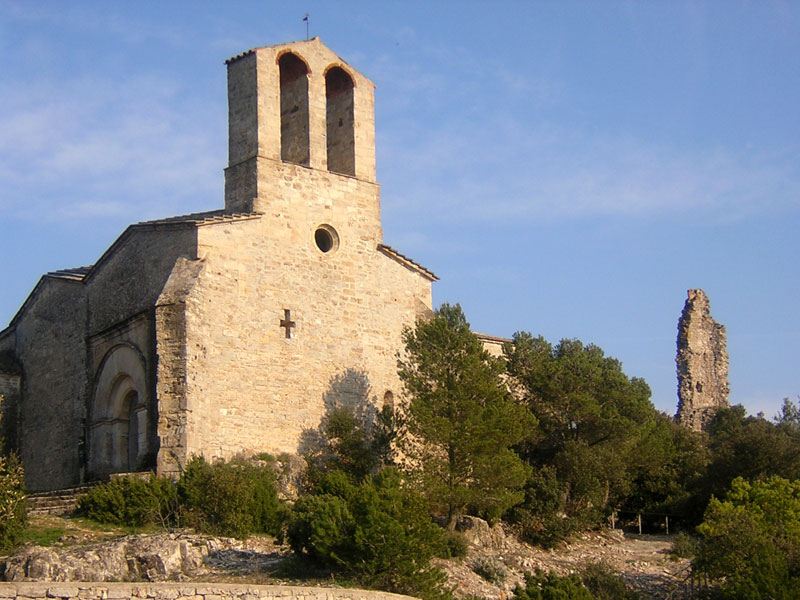 Església i Castell (a la dreta, en ruïnes) de Sant Pere de Vilademàger (alt. 900 mts.), a la Llacuna (Anoia, Barcelona, Spain)